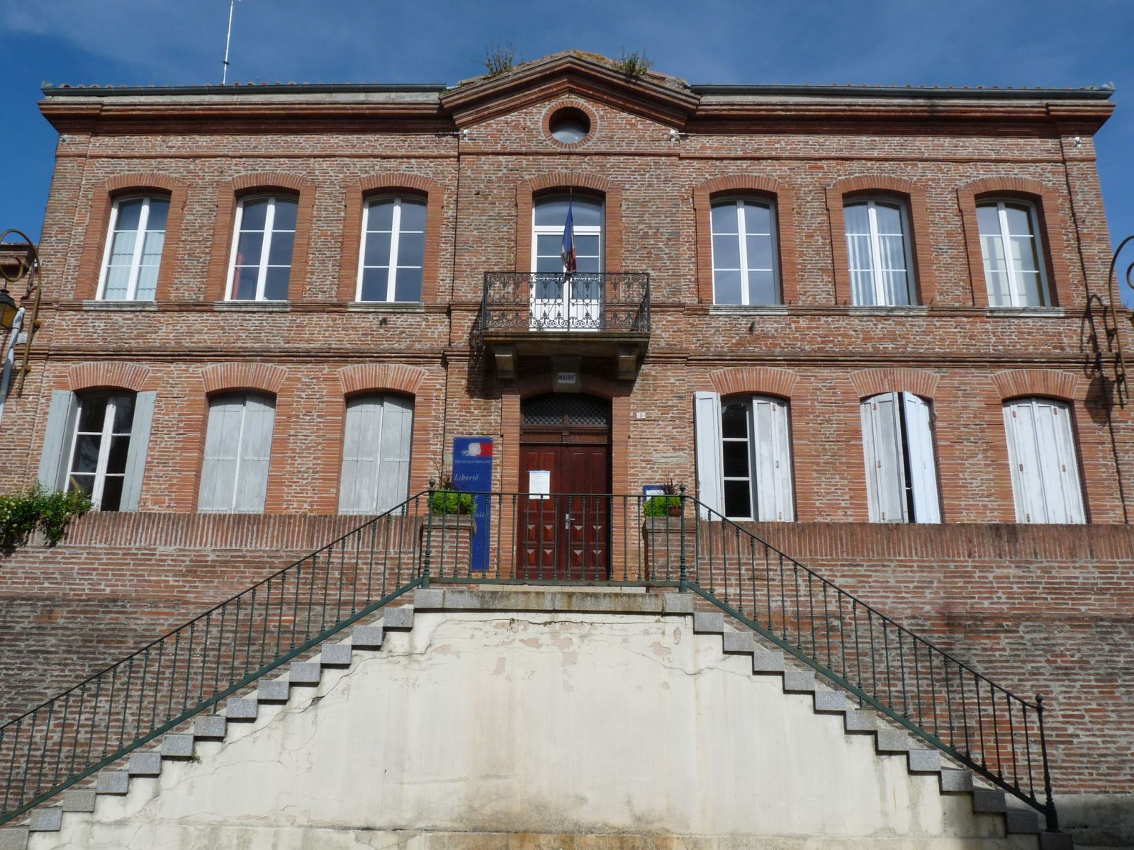 Mairie de Nailloux, Haute-Garonne, France